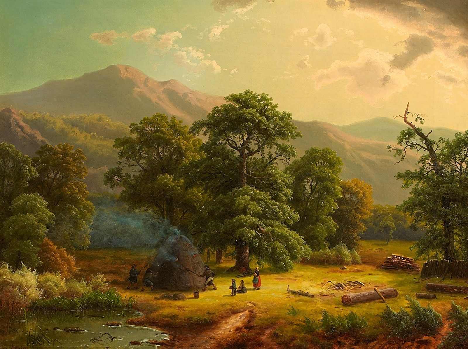 Die Köhler. Signiert Ludw. Scheins. Öl auf Leinwand. 77,5 x 105 cm